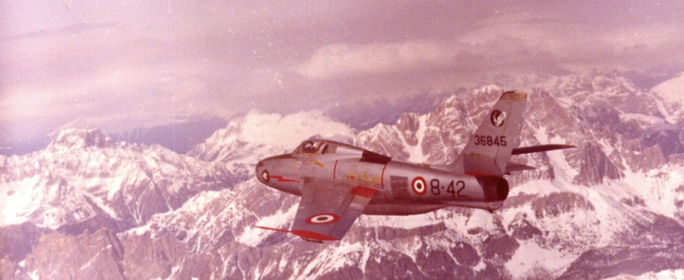 F-84F Thunderstreak in volo sulle Alpi - 8º Stormo, 101º Gruppo